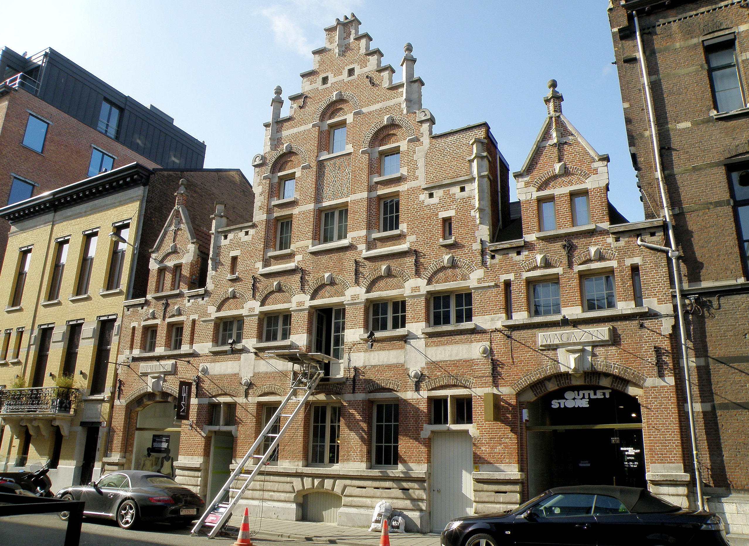 Antwerpen, district Antwerpen. Stapelhuis aan de De Burburestraat nr. 2A (nabij gedempte zuiderdokken), in neo-Vlaamse renaissancestijl, n.o.v. Henri en Leonard Blomme (1883). Vgl. voorts Inventaris Bouwkundig Erfgoed Vlaanderen.